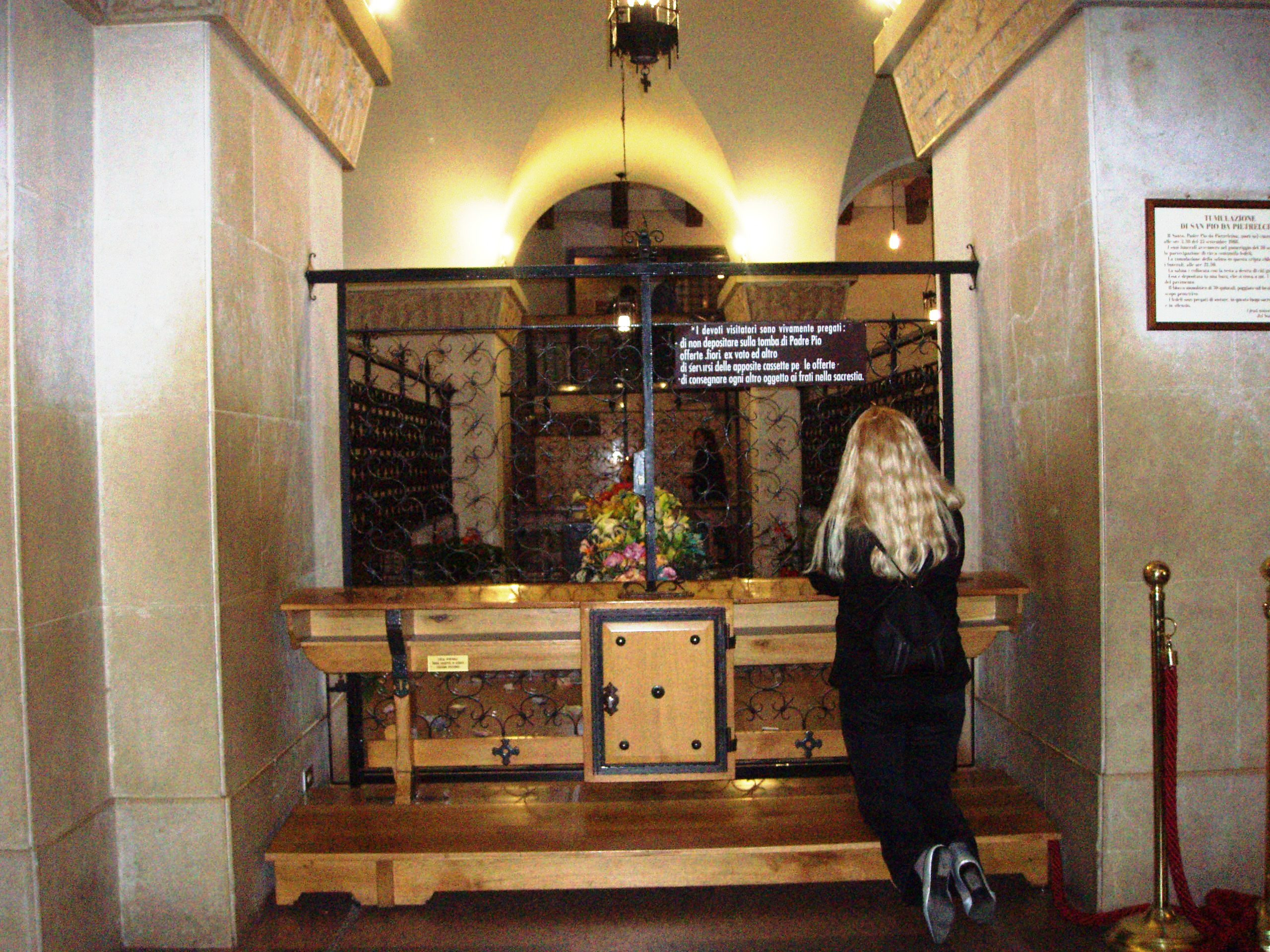 teca padre pio